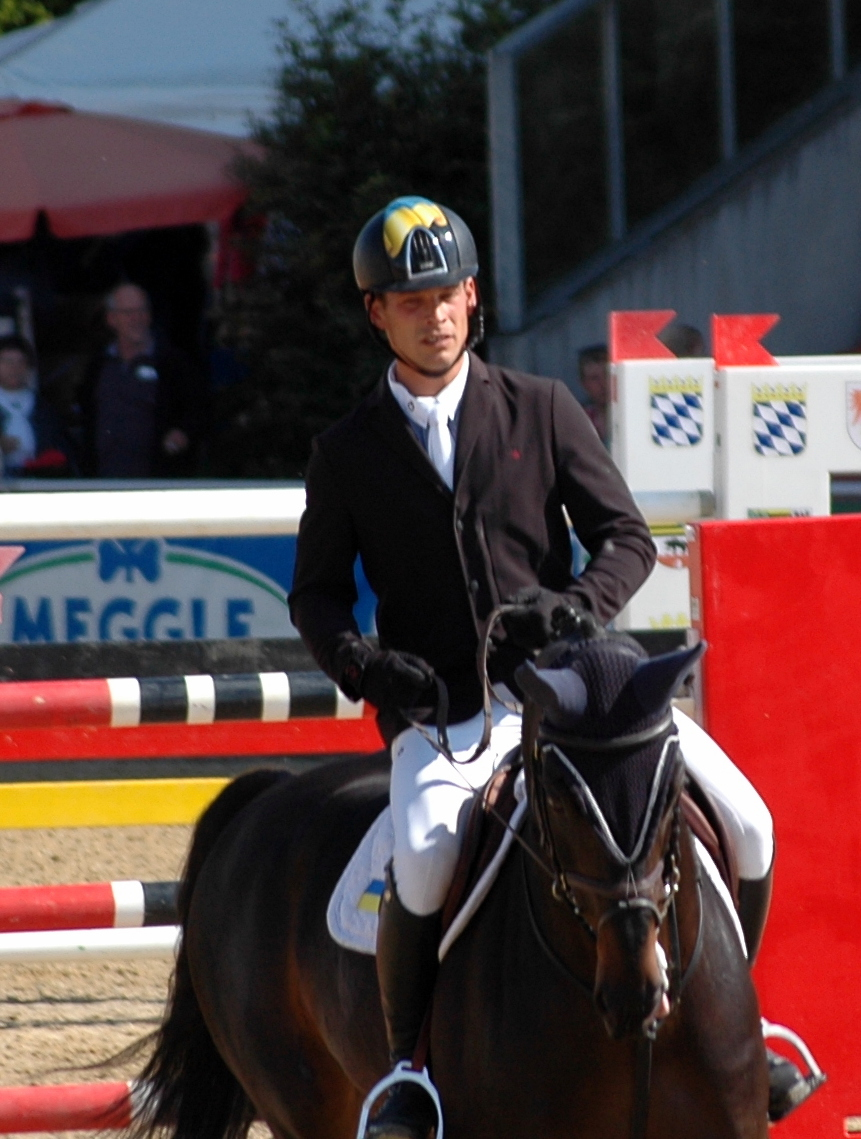 51. Maimarkt-Turnier: Ferenc Szentirmai mit Chadino